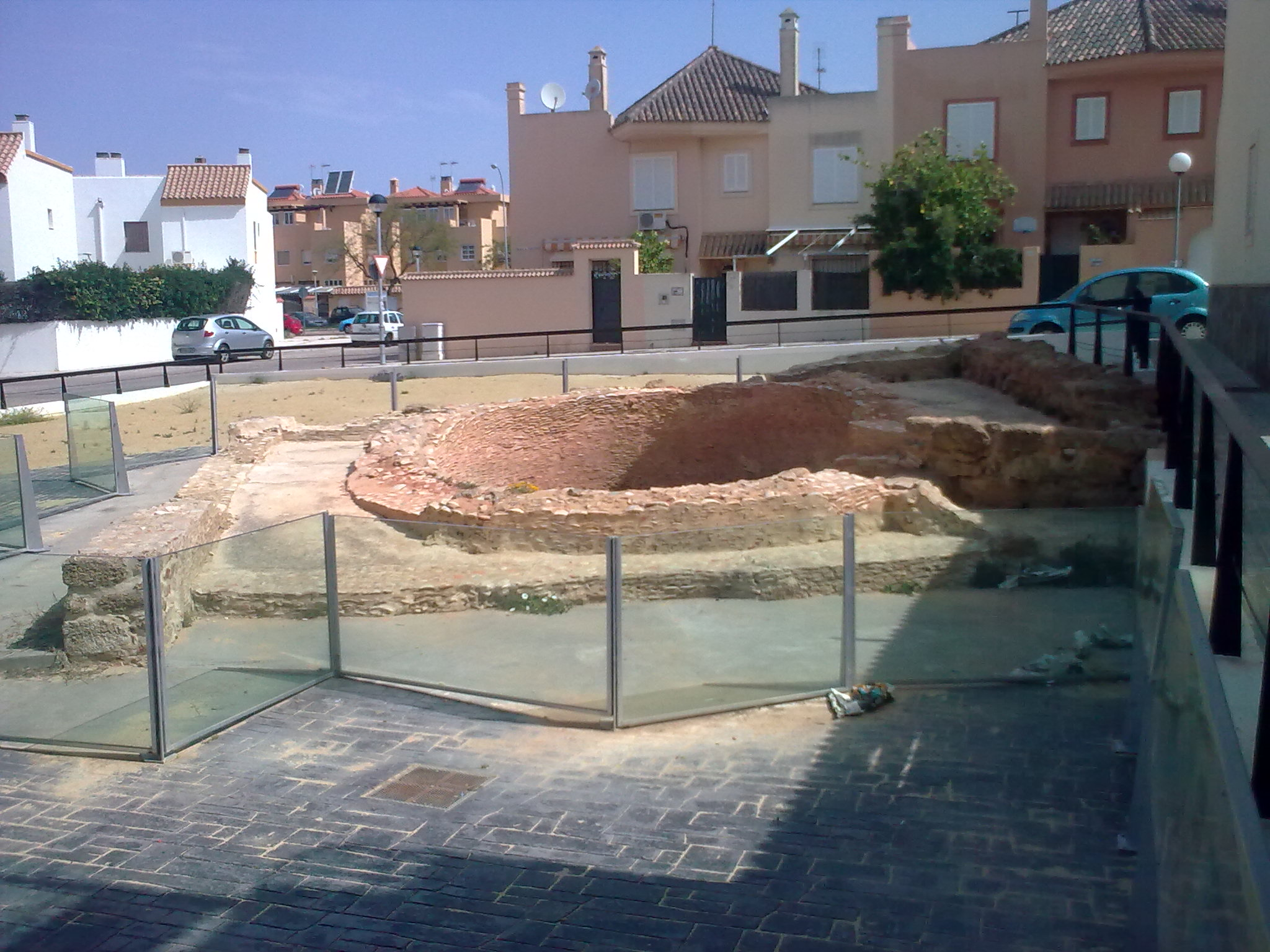 Horno romano antiguo integrado en una urbanización